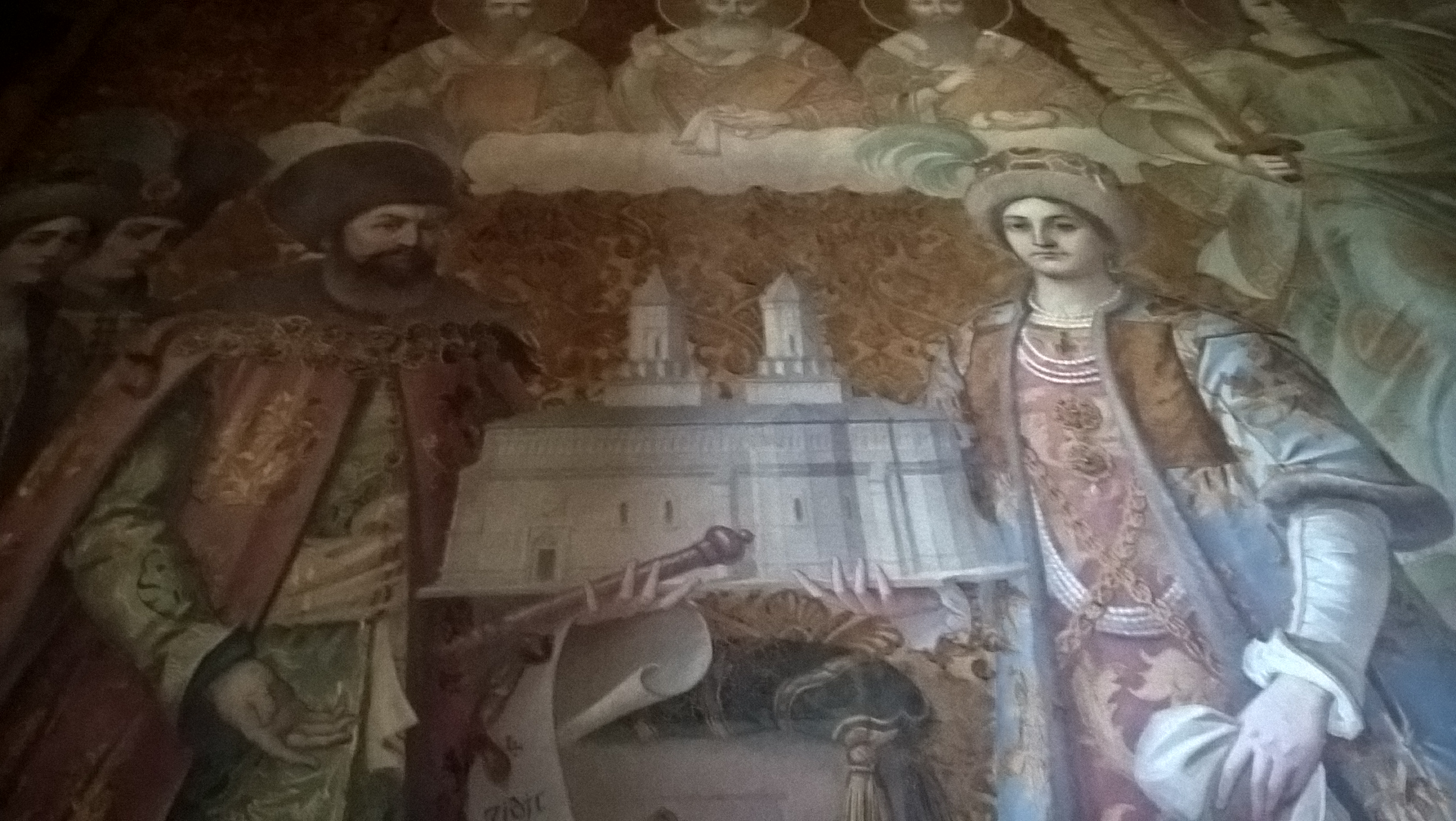 Cerkiew Trzech Świętych Hierarchów w Jassach - fresk z postacią fundatorów